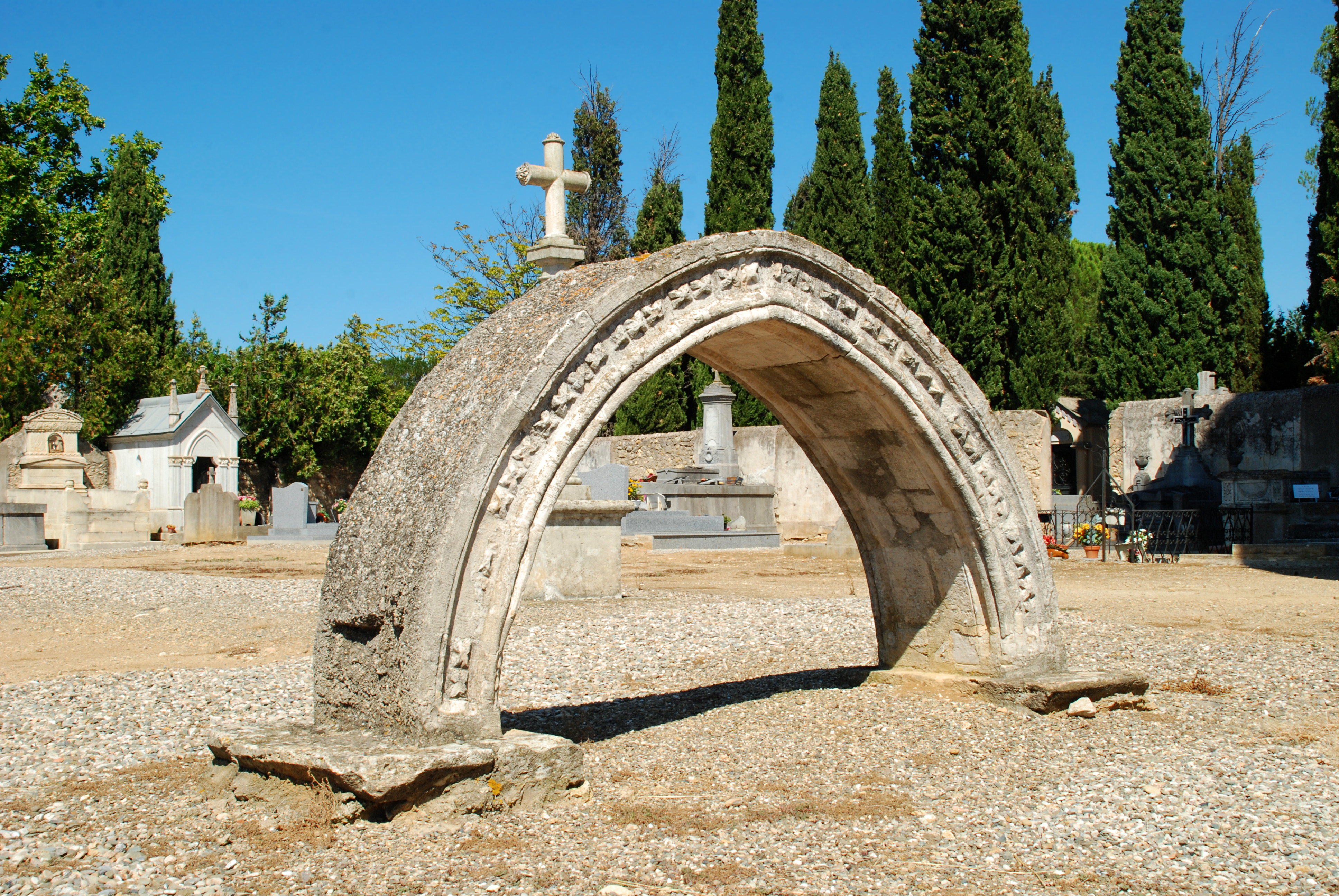 France - Languedoc - Hérault - Puissalicon - ancienne église Saint-Étienne-de-Pézan .